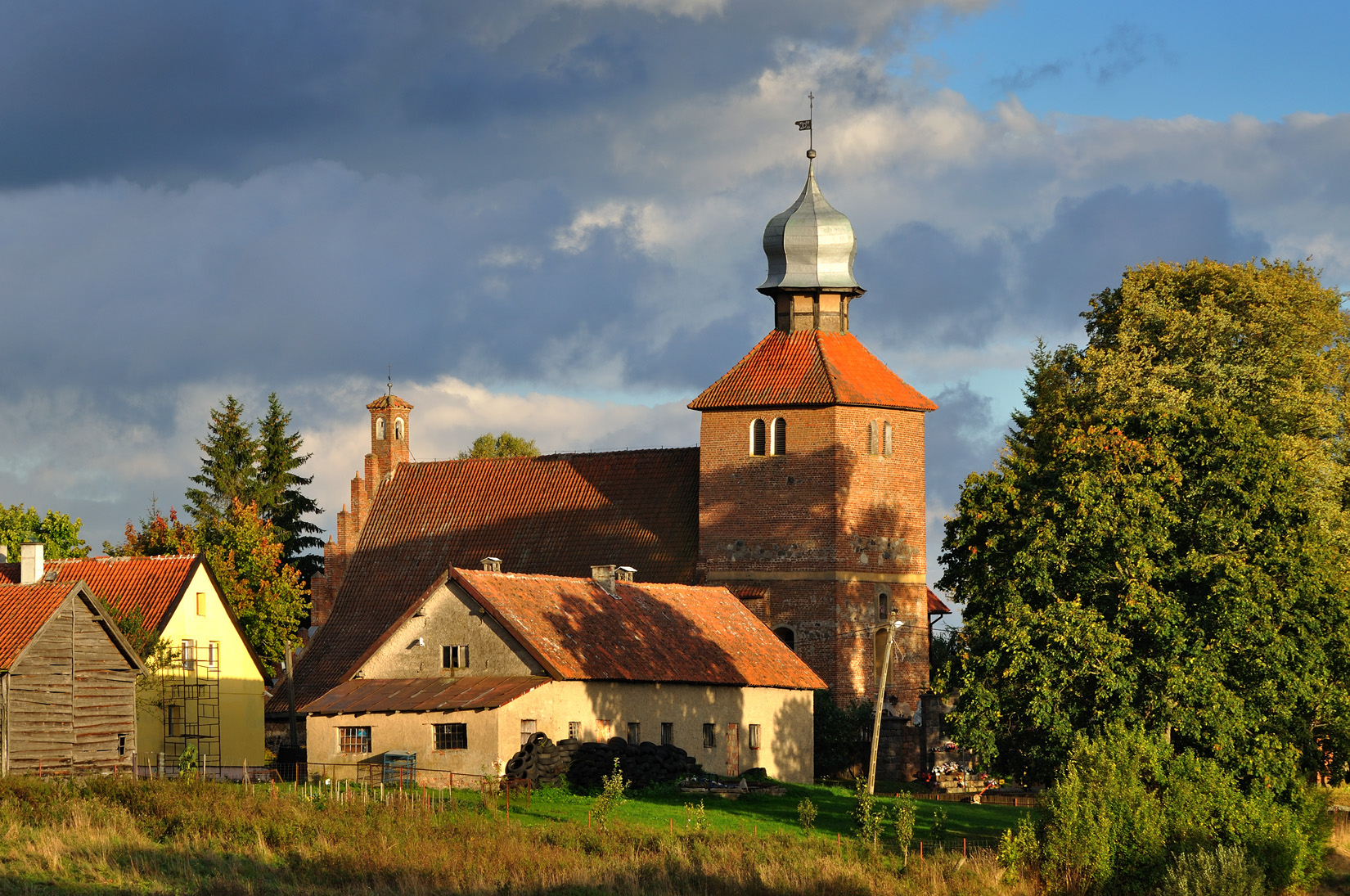 Sząbruk 28 - rzymskokatolicki kościół parafialny pw. św. Mikołaja i św. Jana Ewangelisty, kon. XV, XVIII, 1911-1913